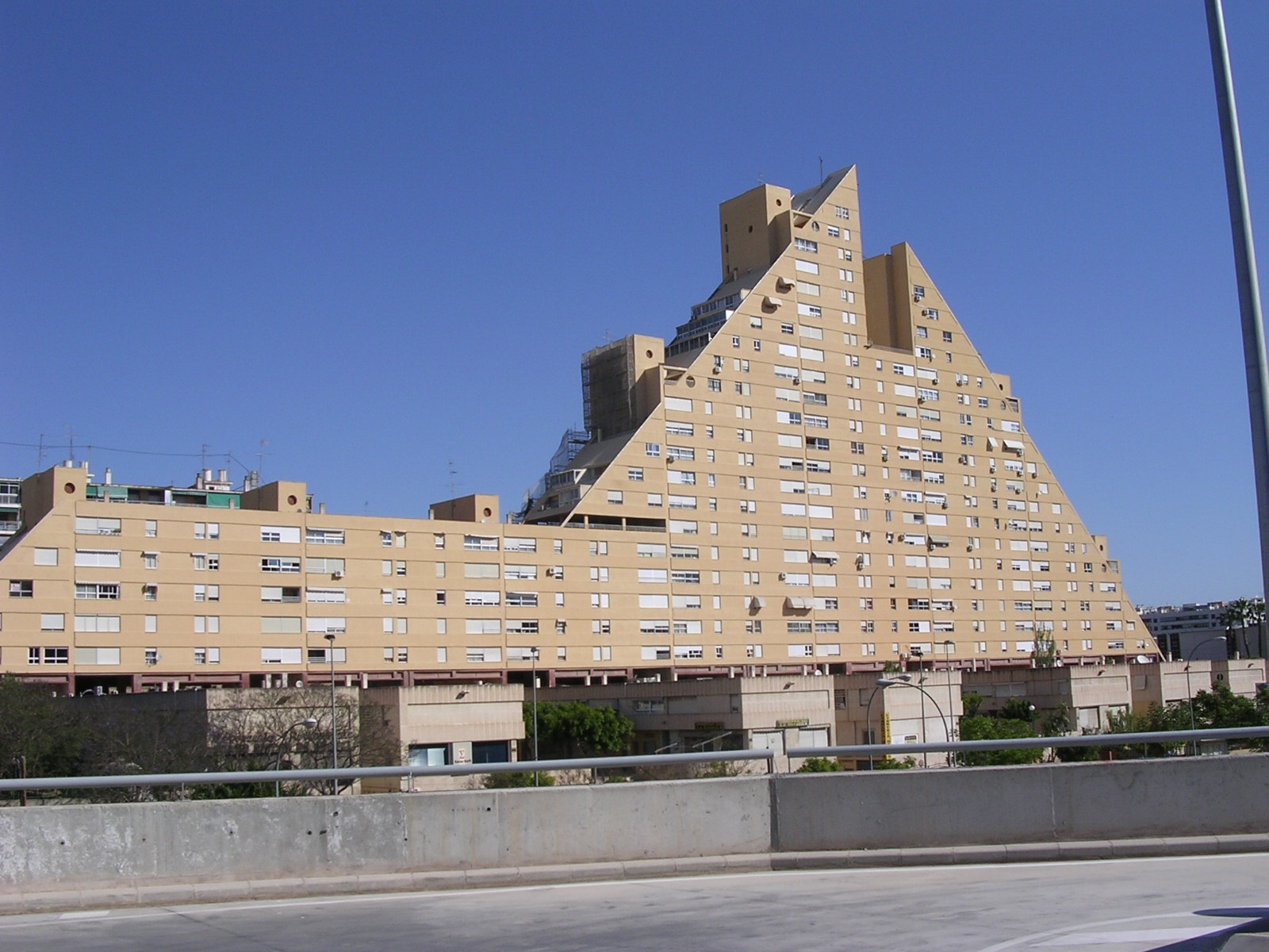 Edificio de la Pirámide, en la zona de la Goteta (Alicante, España)